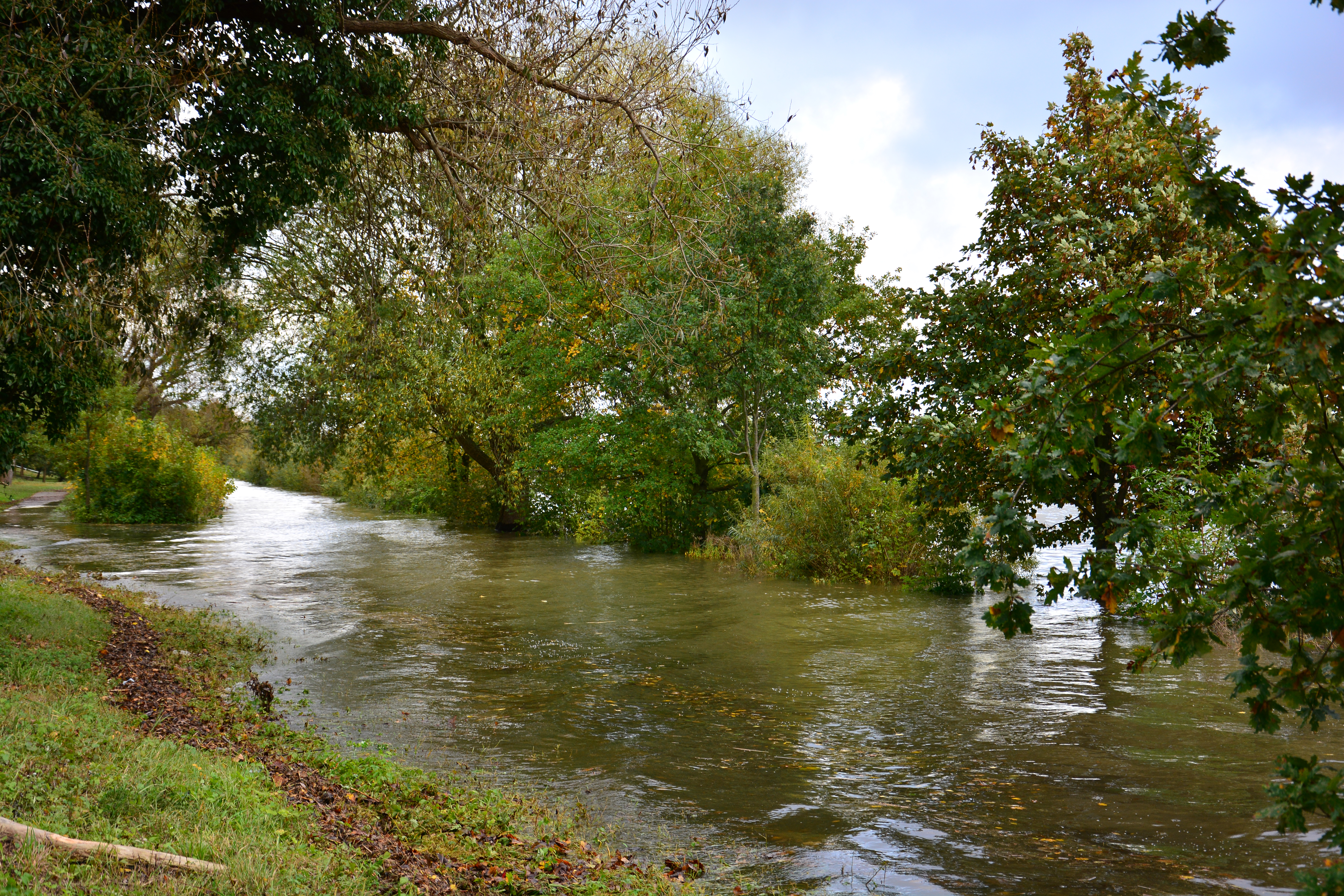 Überflutetes Elbufer in Hamburg-Rissen. Der Ausläufer des Hurrikans Gonzalo führte zu erhöhten Wasserständen an der Nordsee und somit auch in der Elbe bis nach Hamburg.